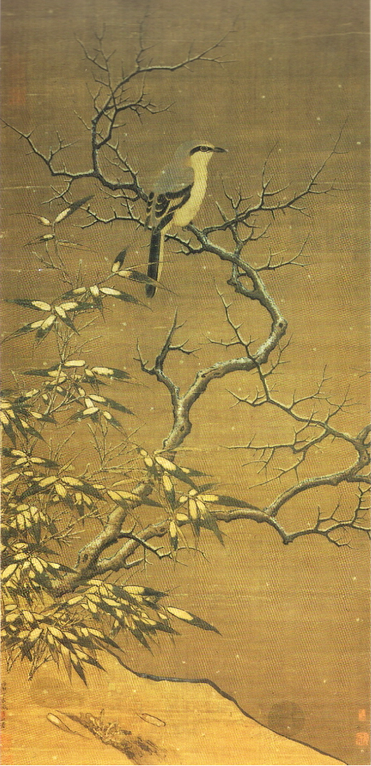 Pie-grièche sur un arbre en hiver, par le peintre chinois Li Di (1100-1197). Rouleau mural, encre et couleur sur soie, datée 1187. (115,2x52,8 centimètres). Musée de Shanghai.